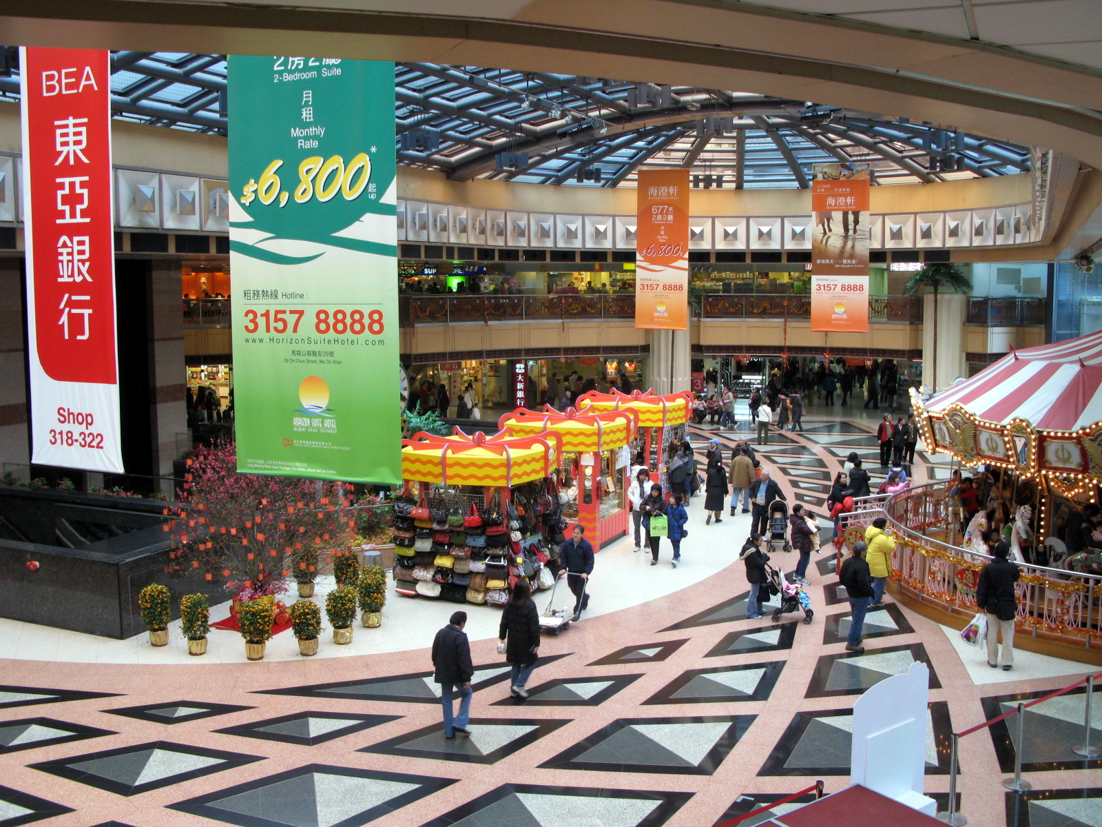 HK MOS Plaza VOID